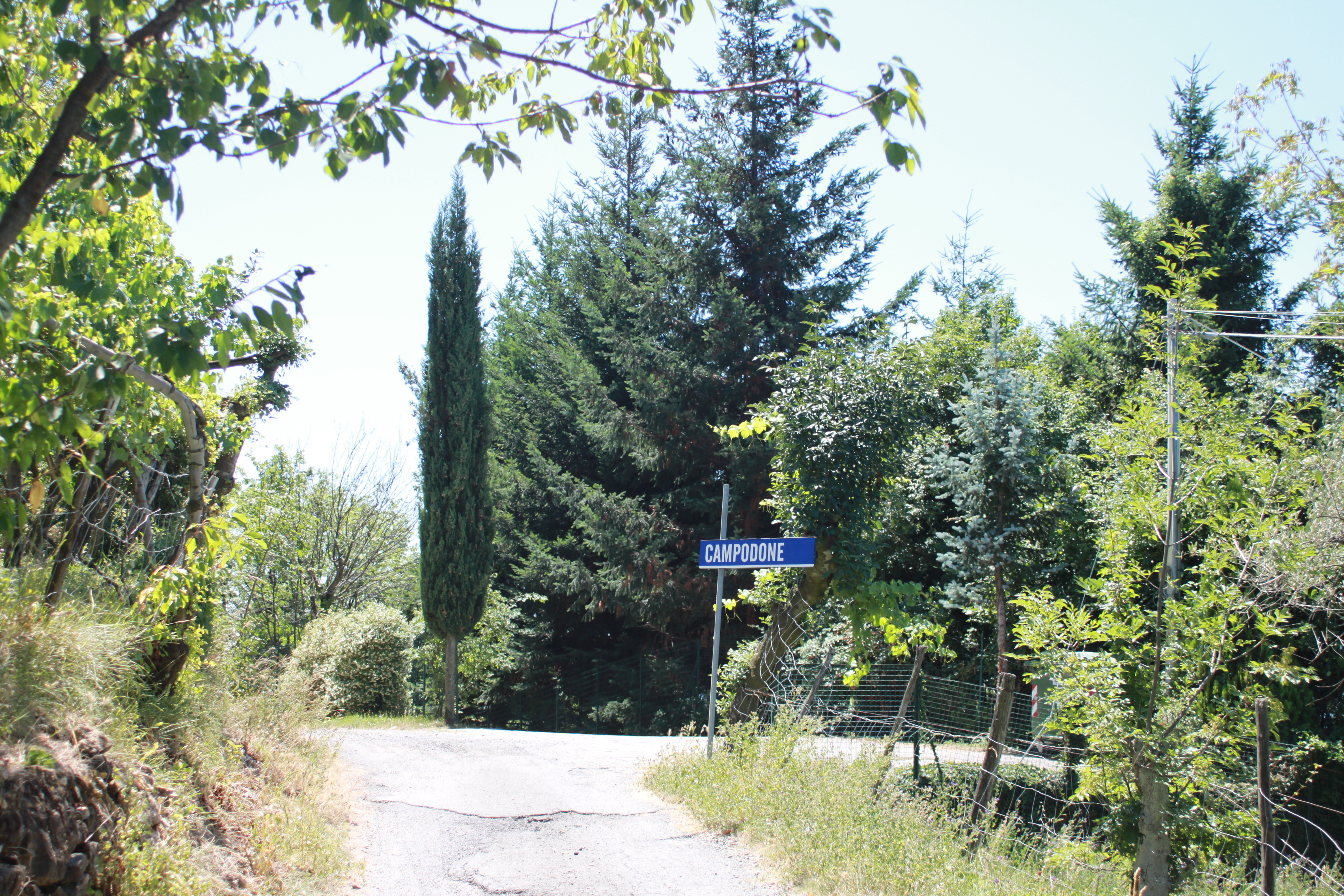 Campodone frazione di Filattiera